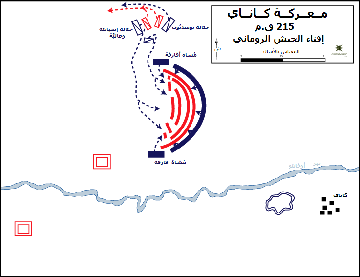 الحرب البونيقيَّة الثانية، معركة كاناي؛ إفناء الجيش الروماني (بِاللون الأحمر) على يد قُوَّات حنبعل (بِاللون الأزرق).